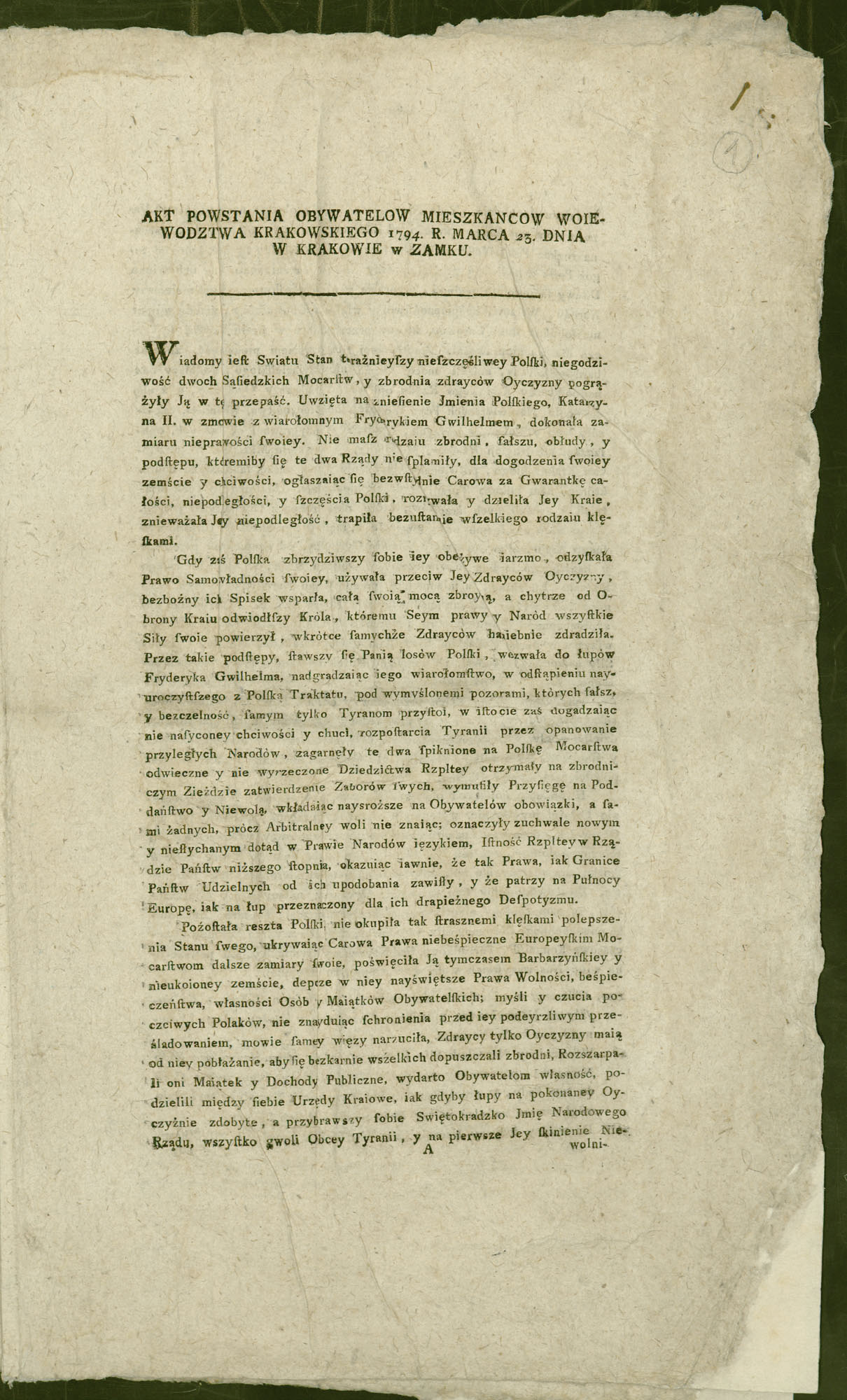 Act of Kościuszko Uprising March 24 1794